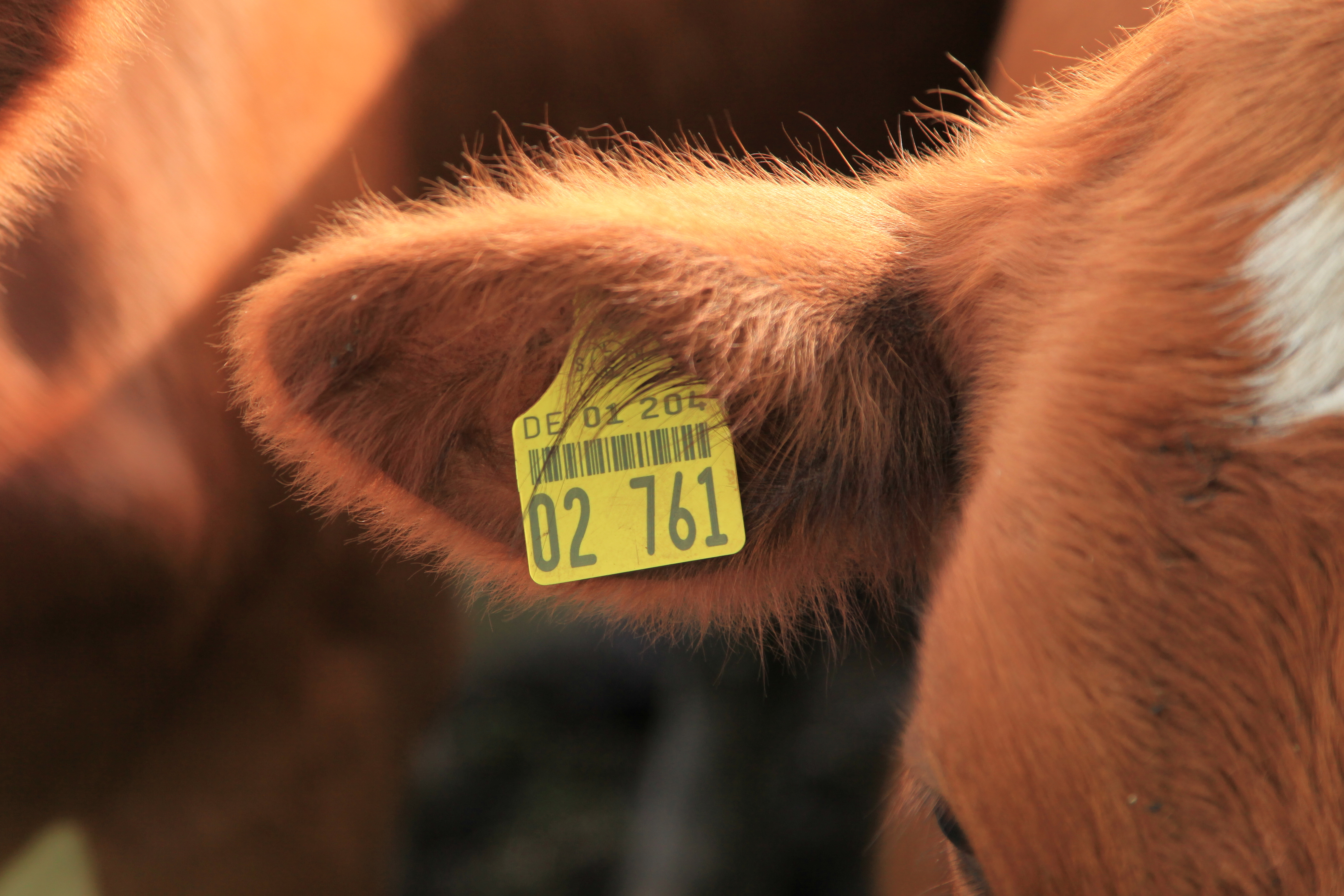 Hartshoper Moor am Grevenskuhler Damm in Sophienhamm